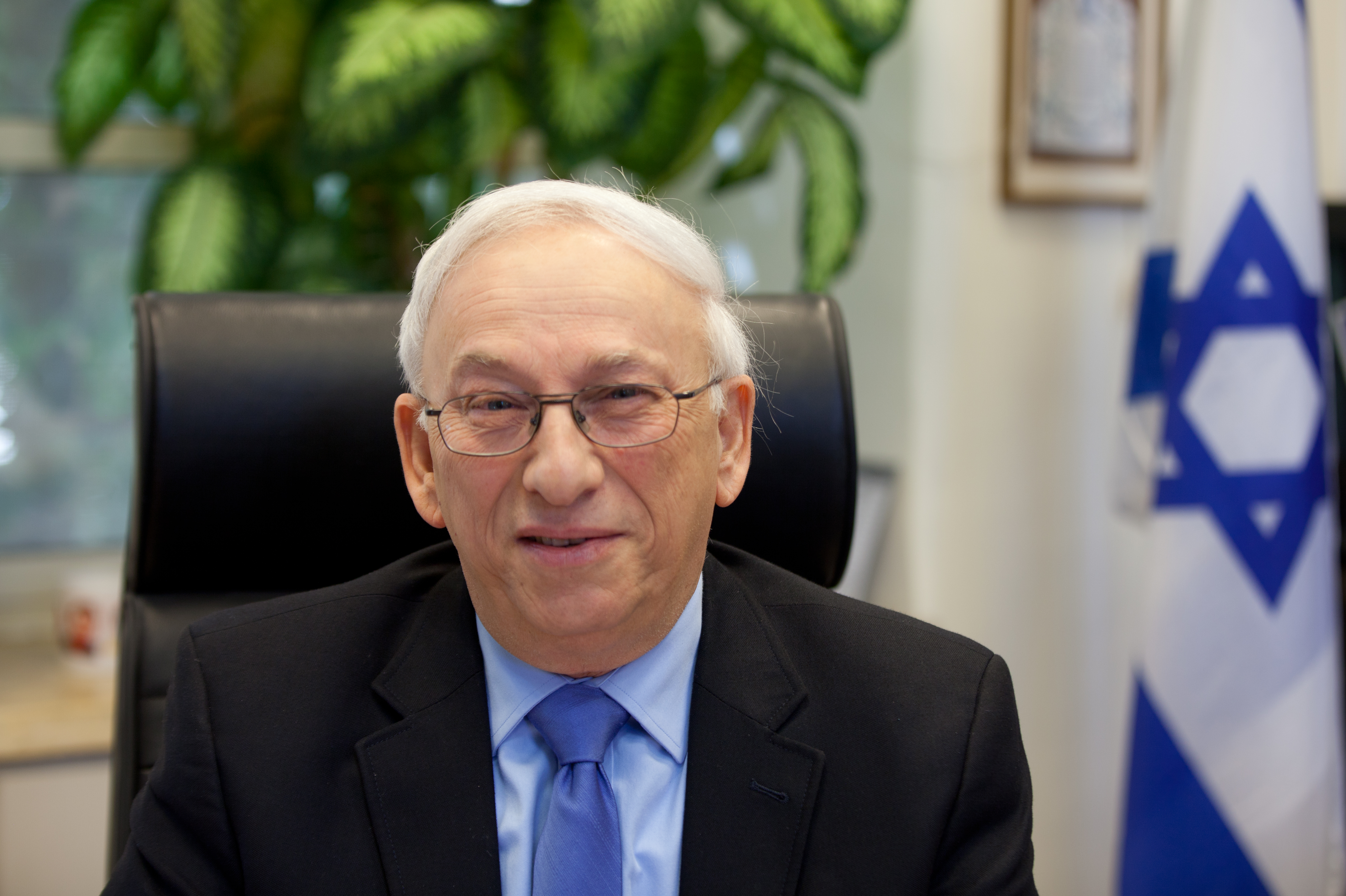 צלם:אלון סגל